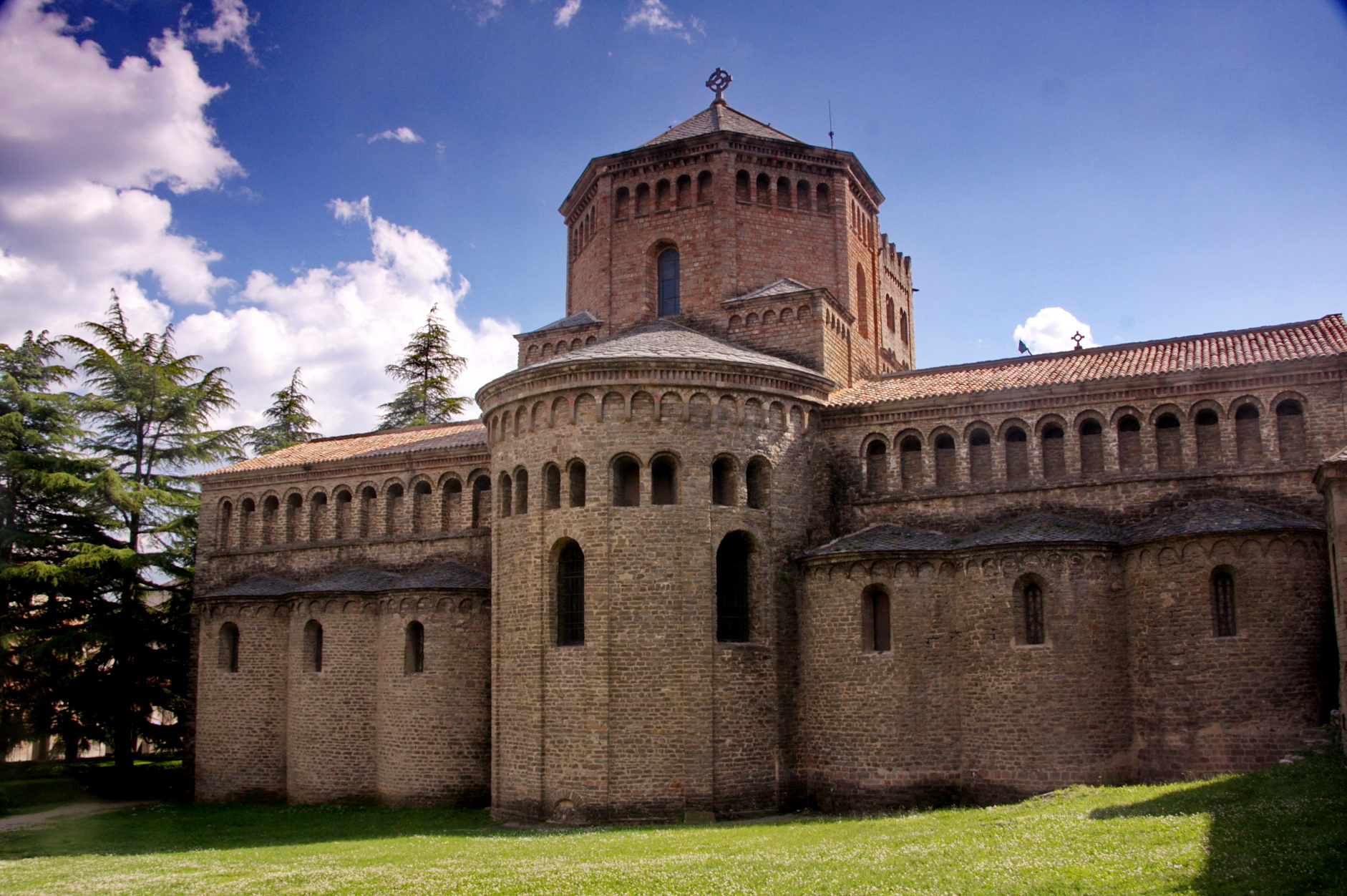 Absis del Monestir de Santa Maria de Ripoll